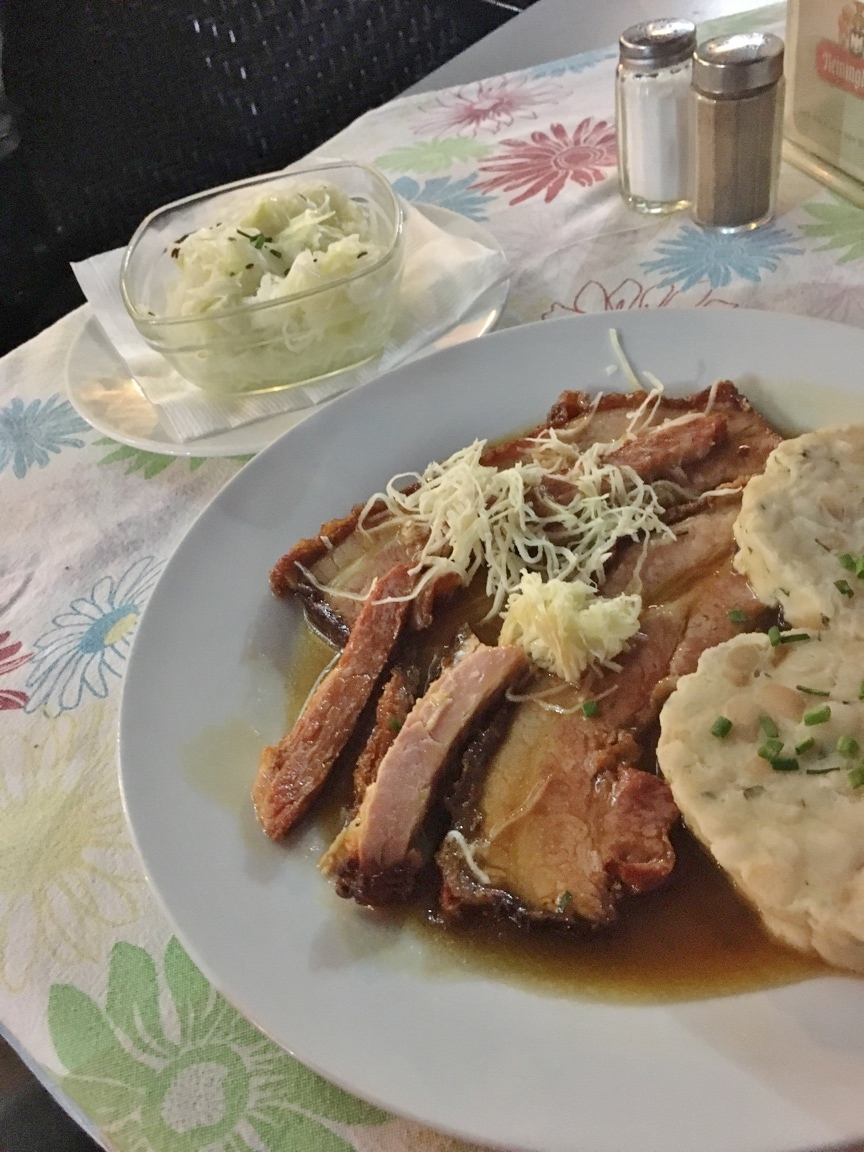 Kümmelbraten mit Serviettenknödel und Krautsalat, Landsknecht an der Wienzeile